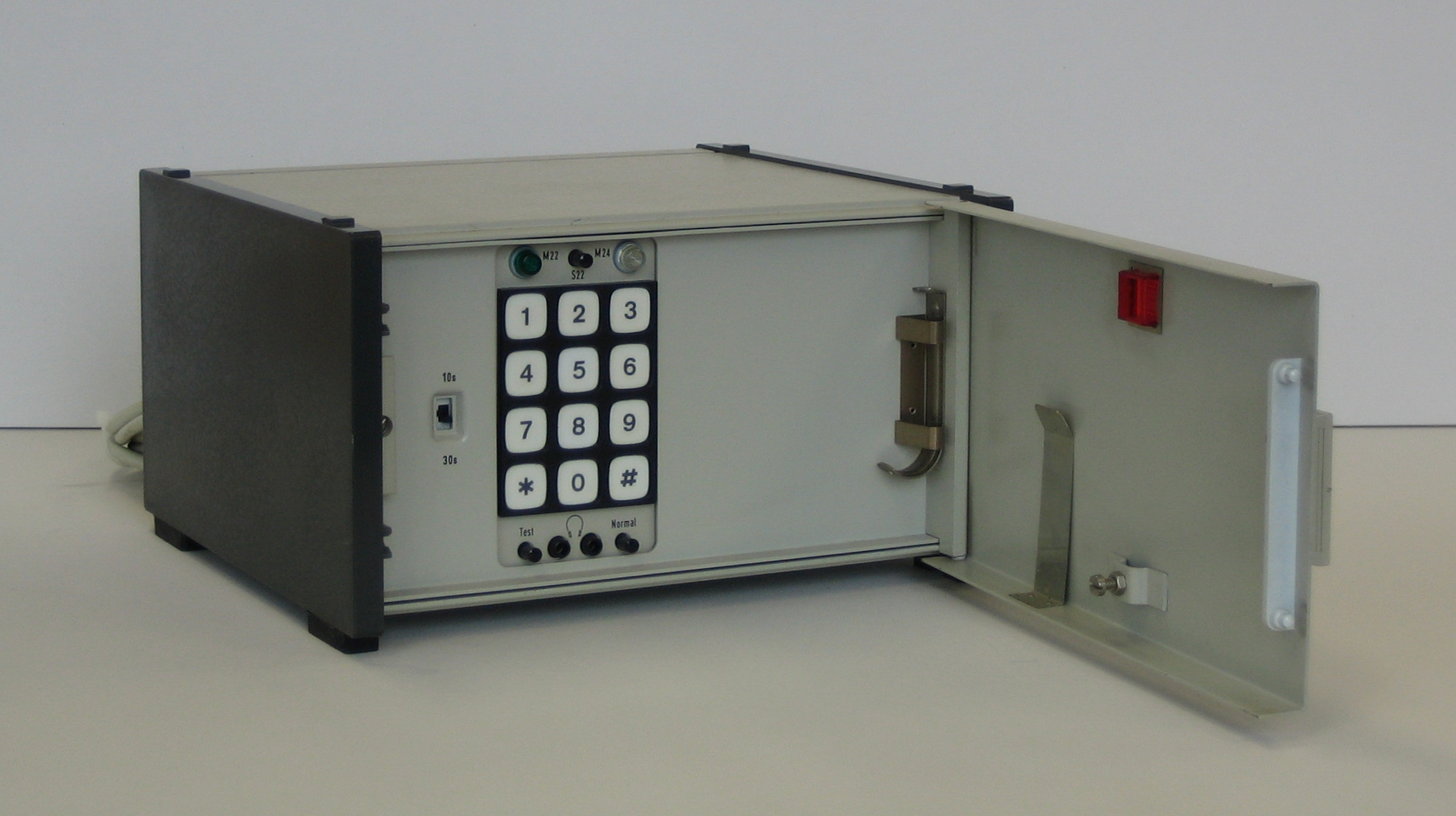 Automatische Wähleinrichtung für Datenverbindungen, Hersteller Siemens, Baujahr 1978 Die Frontplatte des Gerätes wurde für einen Testbetrieb geöffnet Das Tastenfeld erlaubt eine manuelle Wahl eines Teilnehmers Über die obere Taste "S22" wird jede Ziffer enzeln zur Wahl an die AWD übergeben Mit dem Schalter links "10/30 sek" wird die Wartezeit auf einen Antwortton (2100Hz) des angewählten Modems eingestellt. Dieser Schalter ist generell, nicht nur einen Testbetrieb, wirksam. Die Taste "Normal" beendet einen Testbetrieb und wird automatisch durch die justierbare Schraube am geschlossenem Deckel gedrückt.